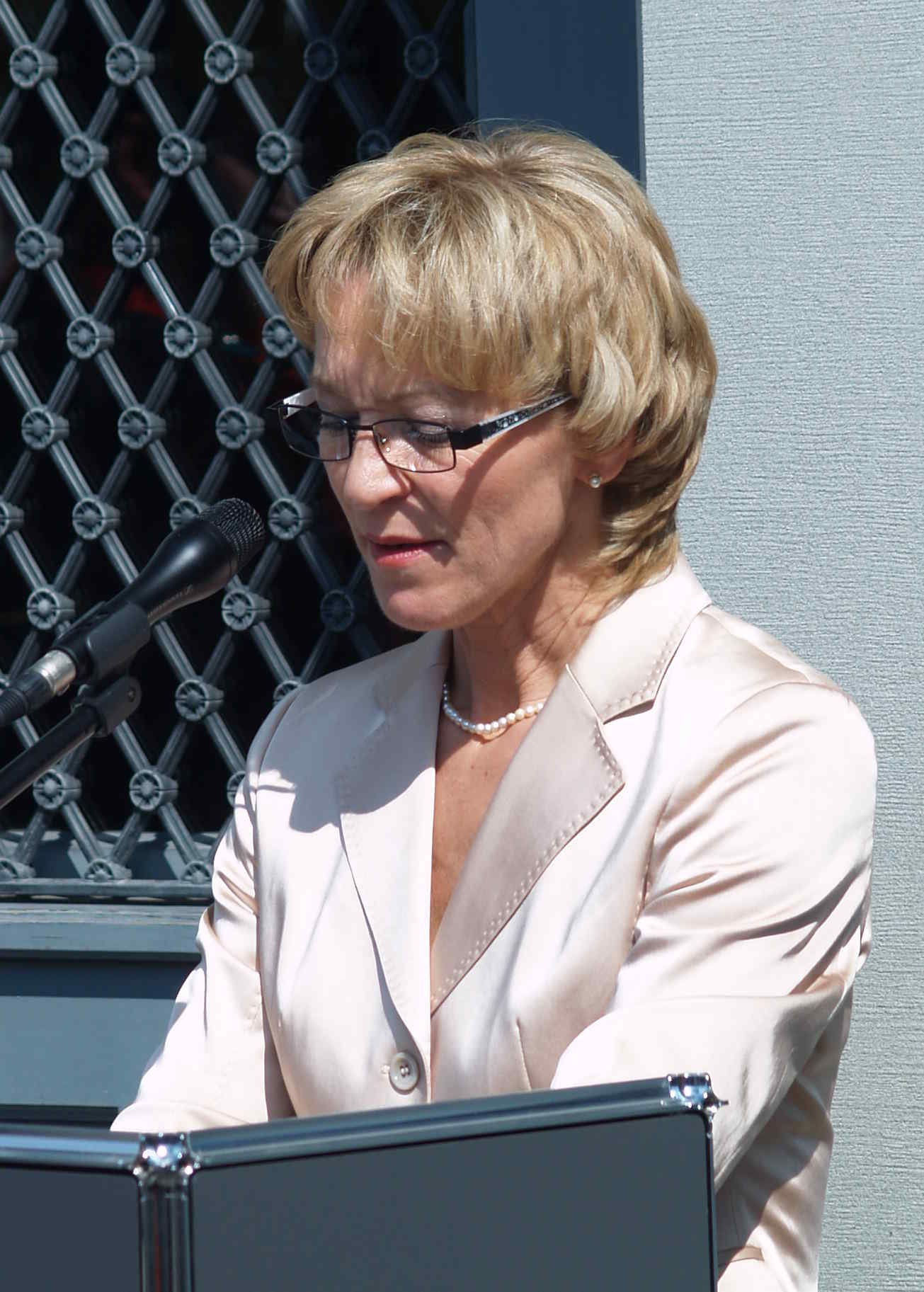 Zürcher Regierungsrätin Rita Fuhrer, während der Festansprache 150 Jahre Glattalbahn